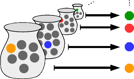 Illustre l'axiome du choix